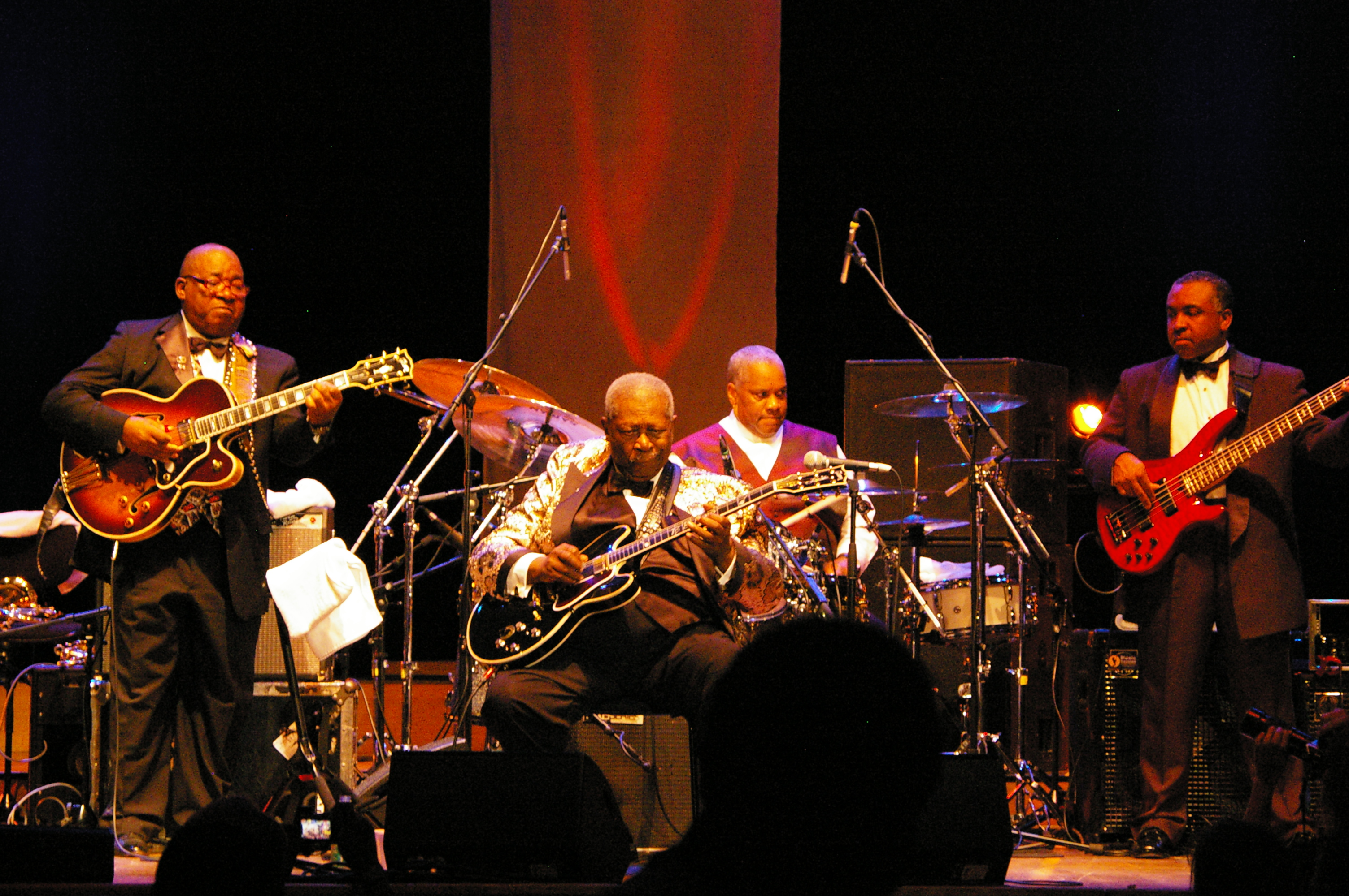 B.B.King Live im Konzerthaus Wien 17.7.2009